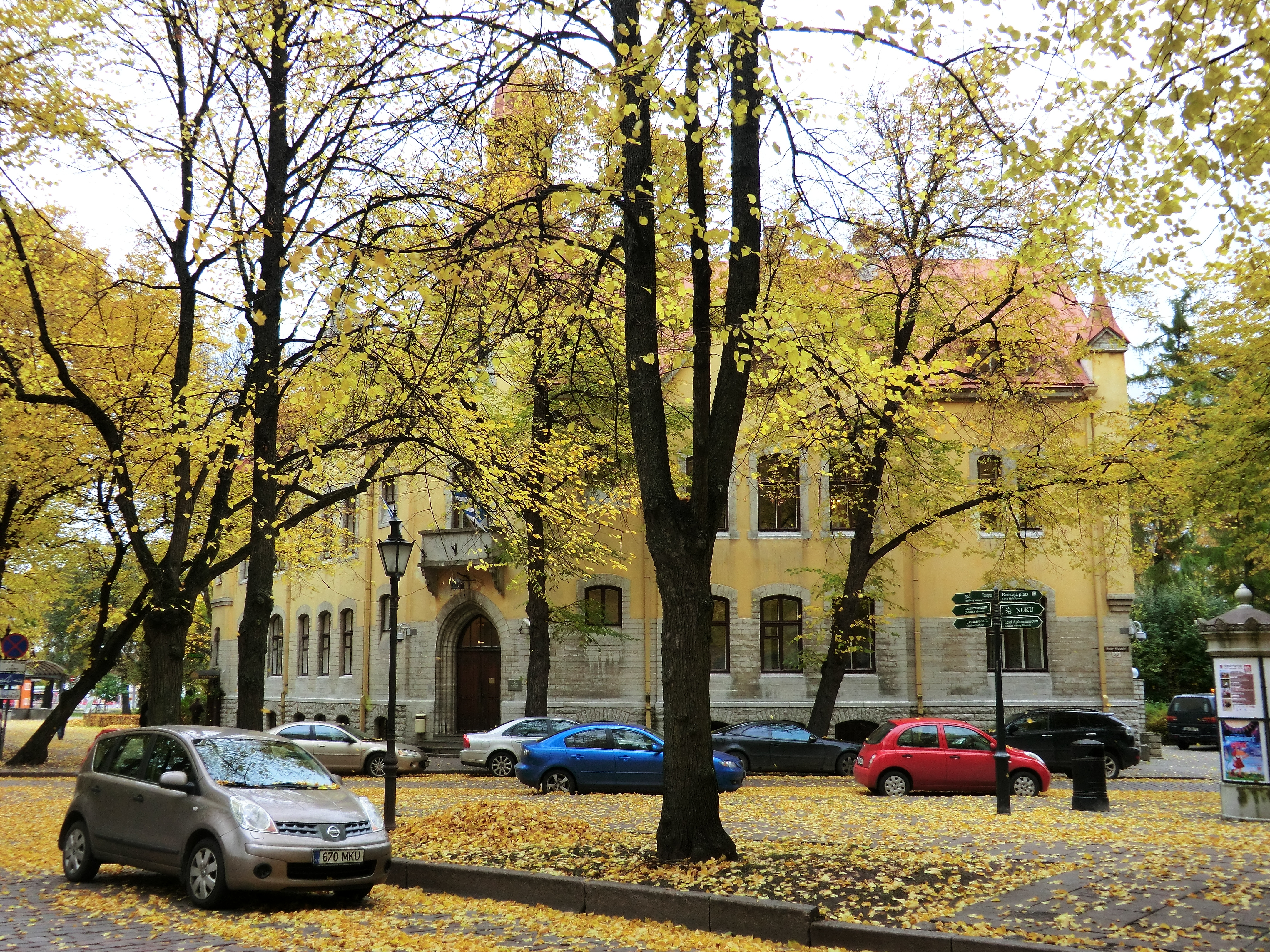 Tallinn